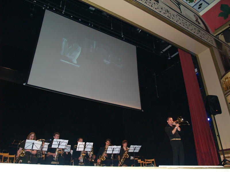 LittleBand en Viveiro